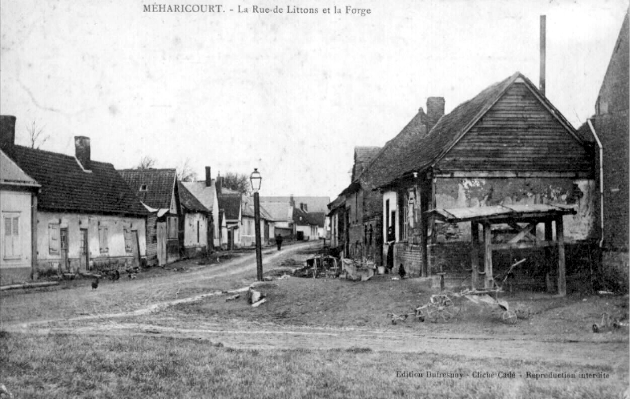 Méharicourt (Somme, France) Carte postale ancienne datant de 1905 environ ("Rue de Littons et la forge - Édition DUFRESNOY - Cliché CADÉ"). La description avec mention de la rue contient une erreur (faute d'impression) : Il ne s'agit pas de la rue de "Littons" mais de la rue de Lihons (village immédiatement voisin, au Nord-Est de Méharicourt). On remarque en particulier un "travail à ferrer", à droite.